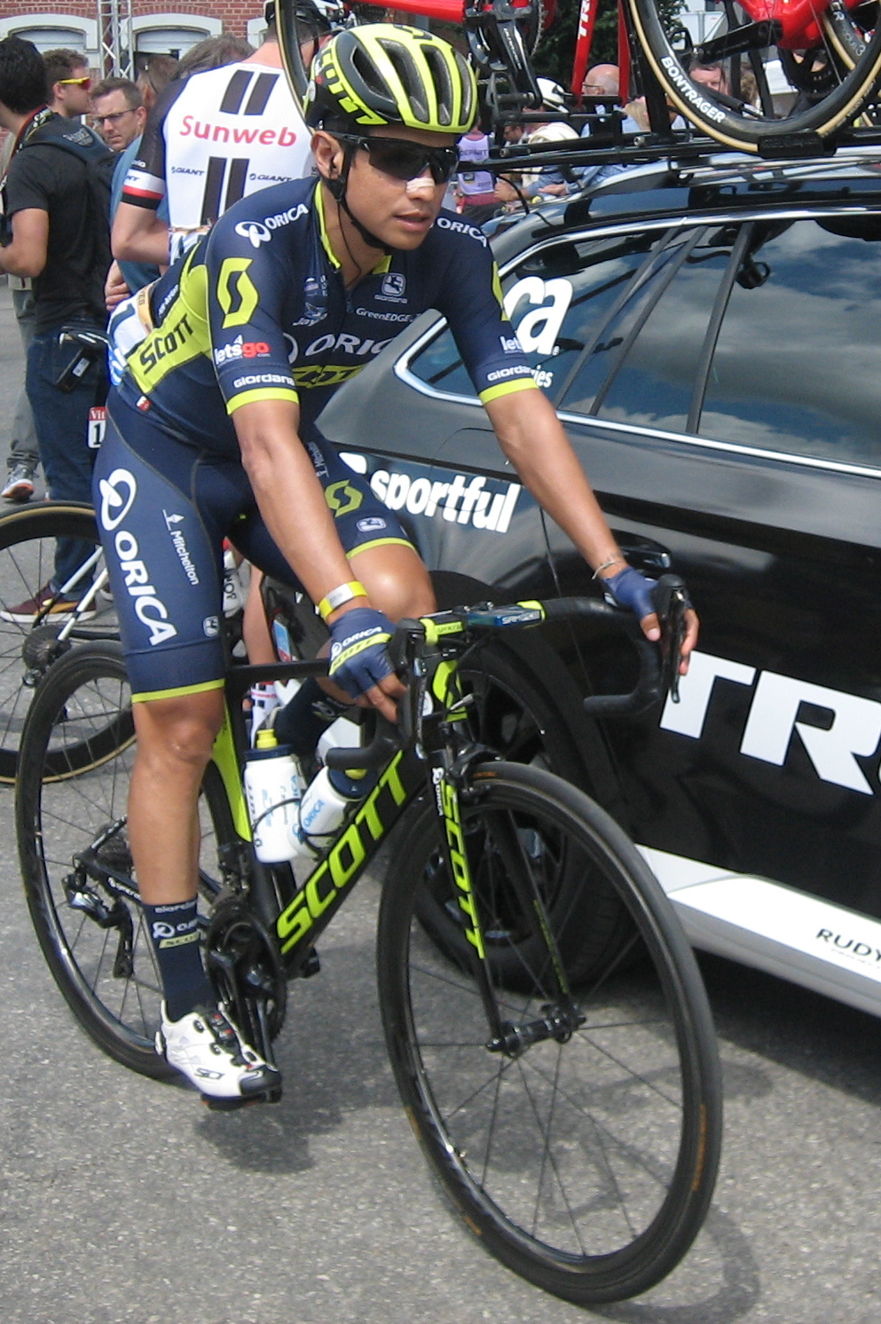 Start in Verviers (België) van de 3e etappe van Le Tour de France 2017.